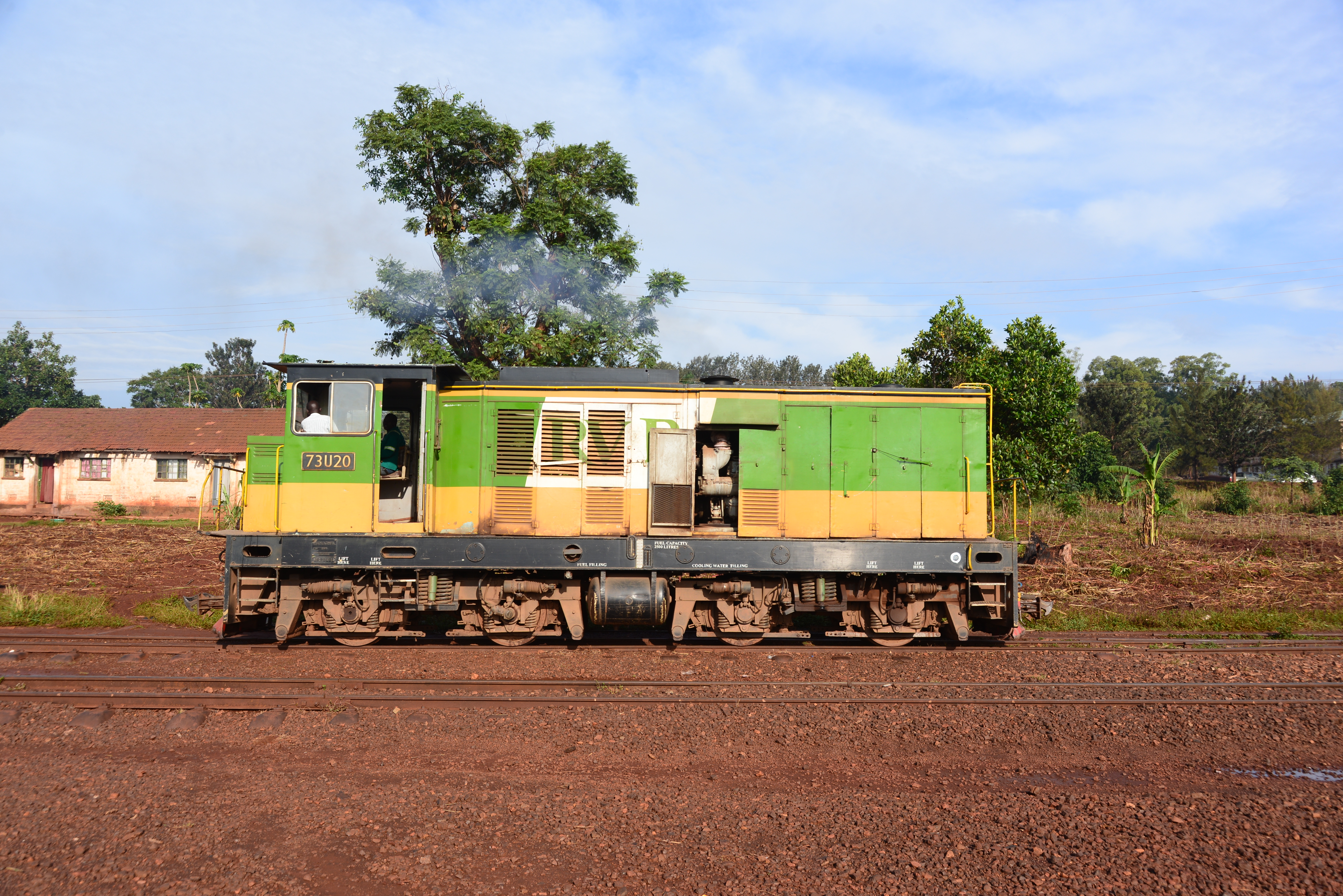 Lok 73U20 im Bahnhof Jinja